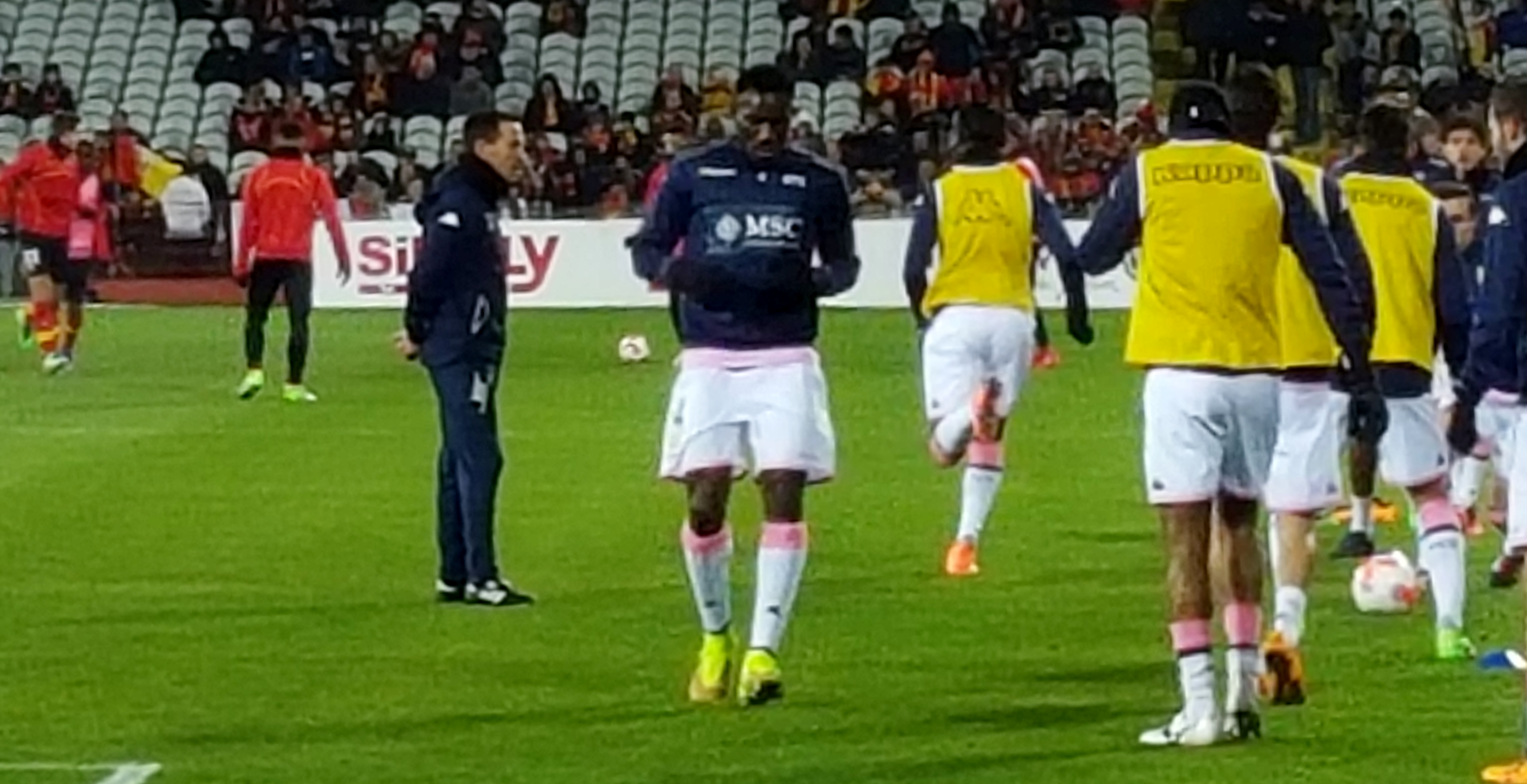 Aaron Appindangoyé avant le match RC Lens / Evian TG, comptant pour la vingt-huitième journée du Championnat de France de football de Ligue 2, le 29 février 2016, au Stade Bollaert Delelis